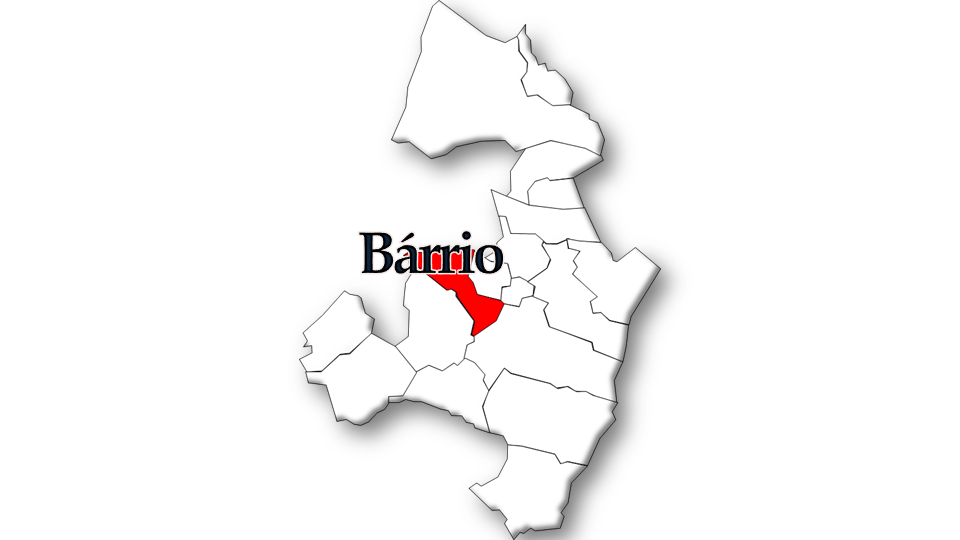 População